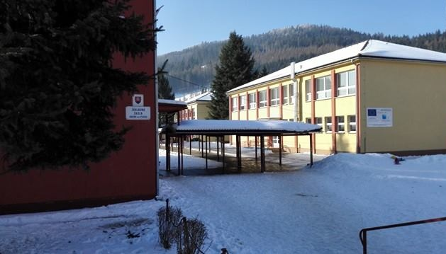 Pohľad na časť Základnej školy Mládežnícka v Krásne nad Kysucou